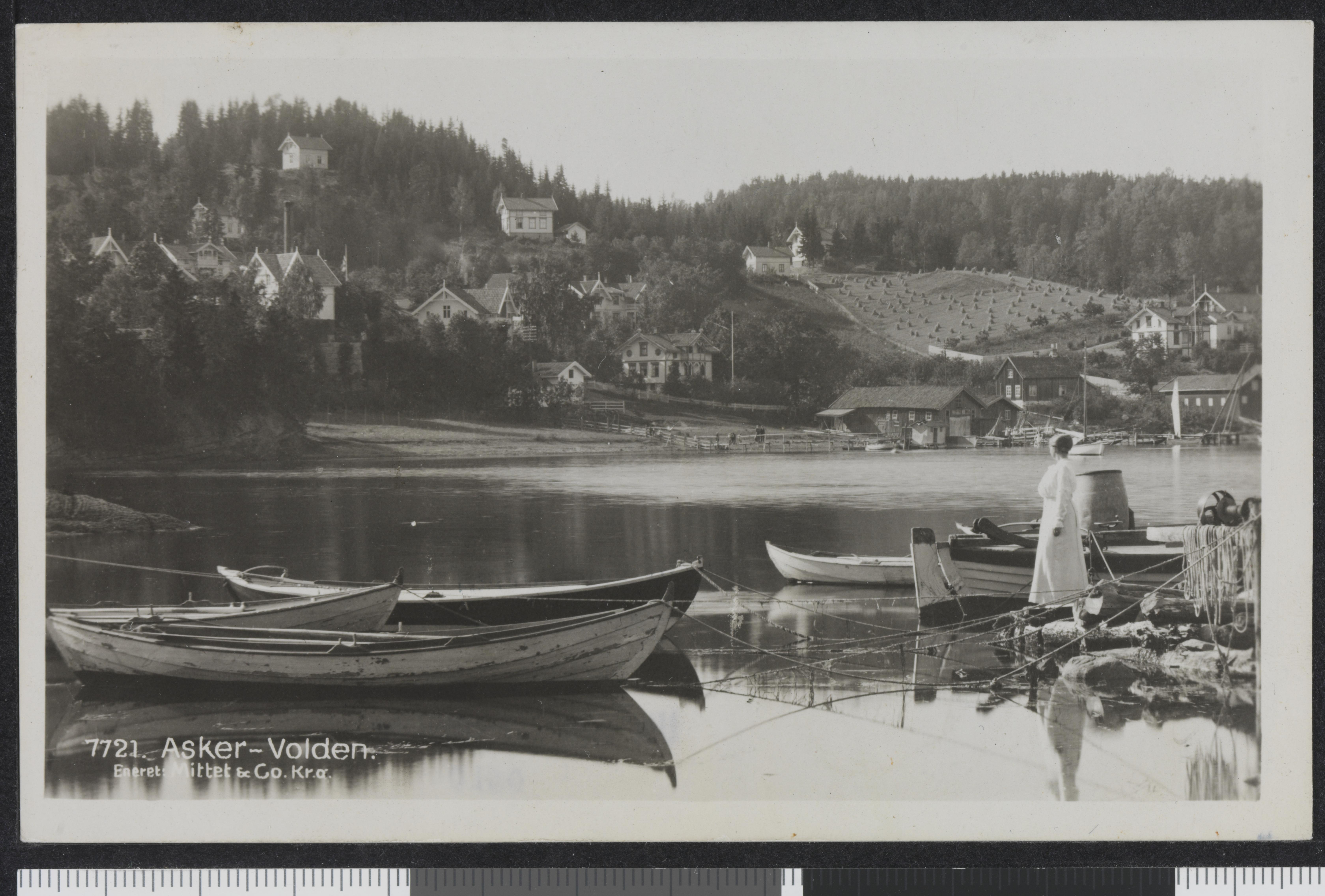 Bildet er hentet fra Nasjonalbibliotekets bildesamling Vollen, Asker, Akershus